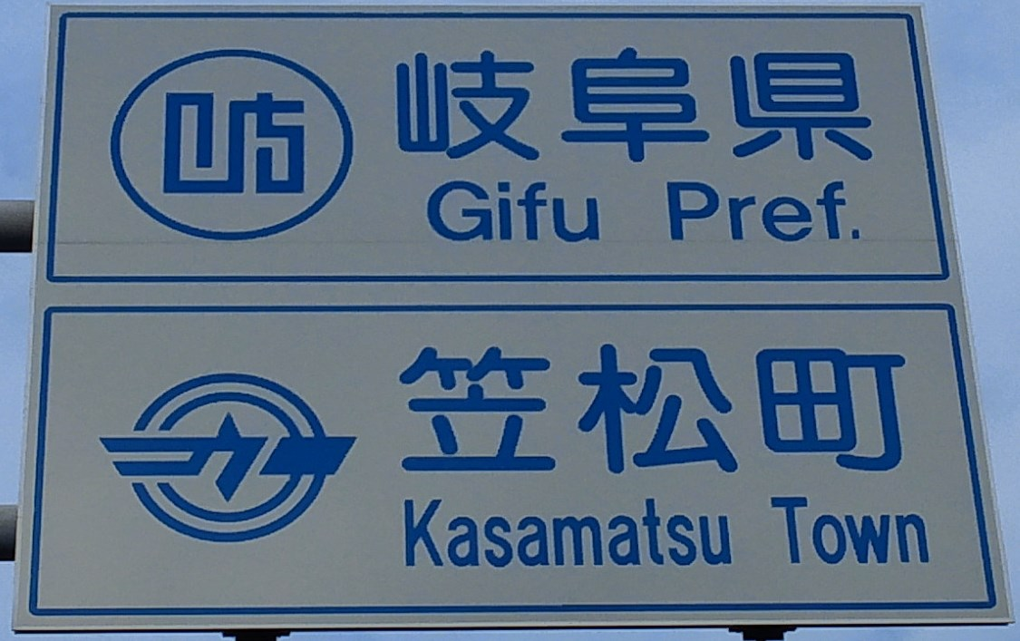 岐阜県道14号線に設置されている岐阜県笠松町のカントリーサイン